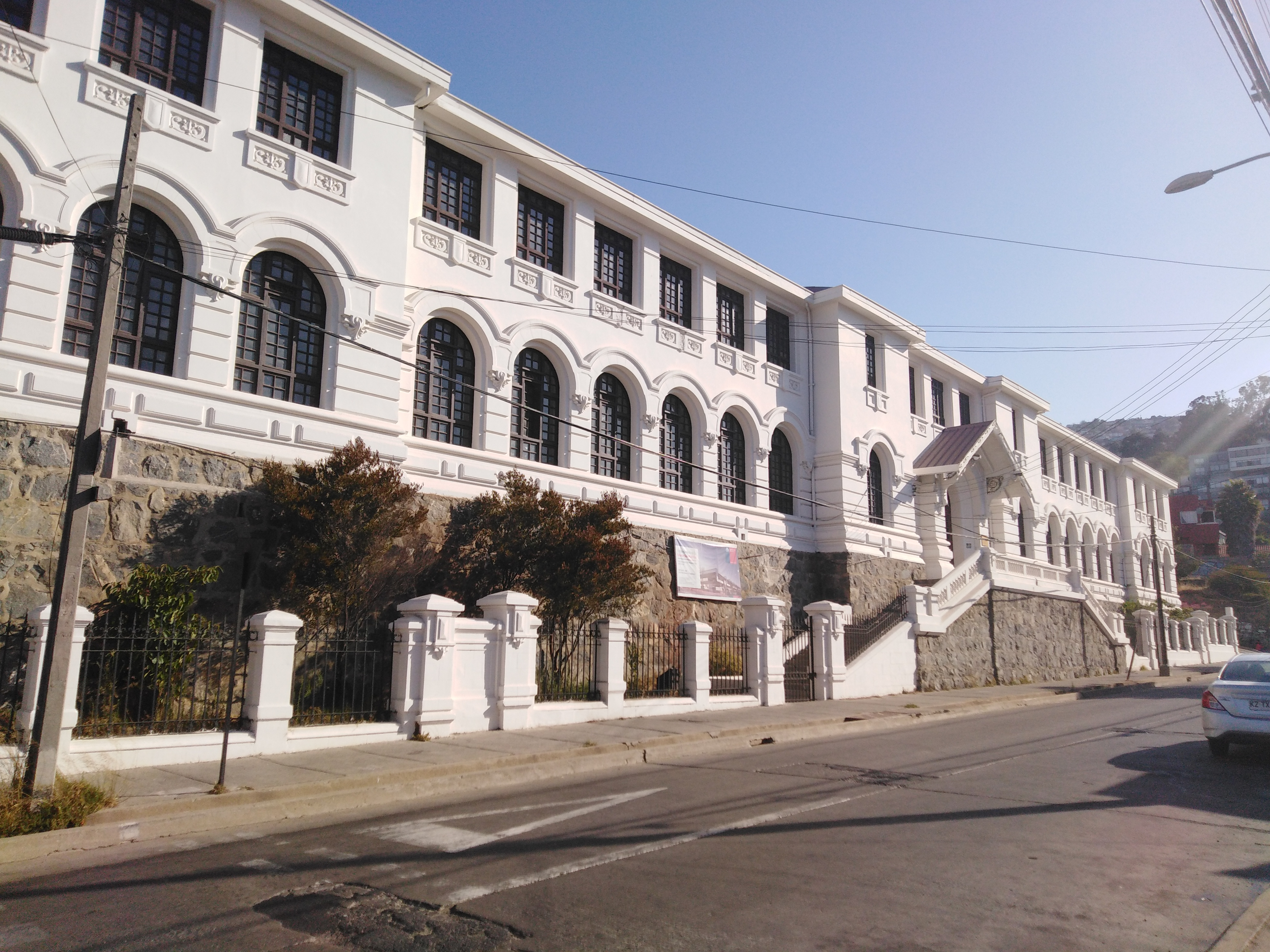 Vista principal del Colegio Pedro Montt de Valparaíso, en la avenida Alemania.